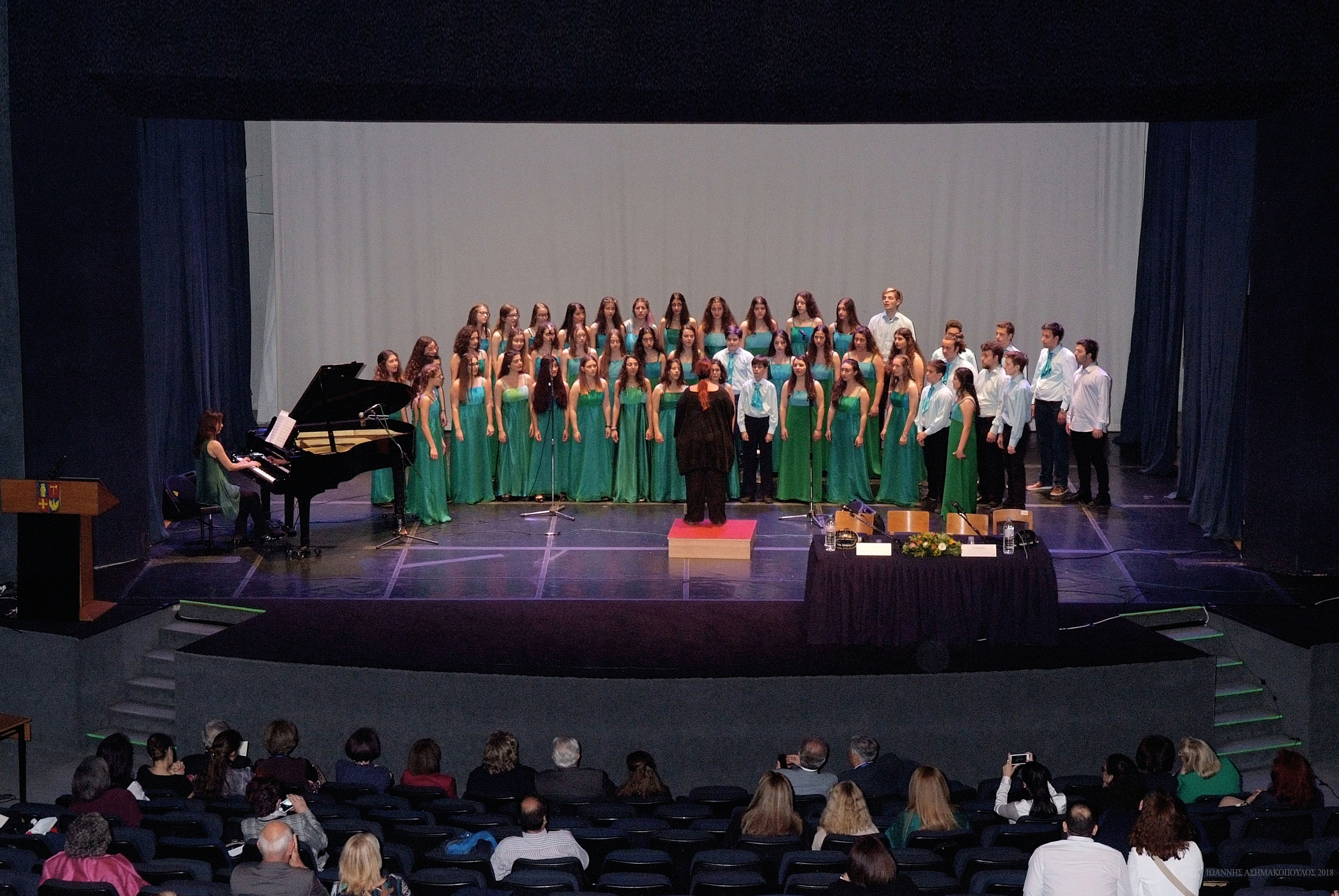 Η Χορωδία Rosarte σε live εμφάνιση.